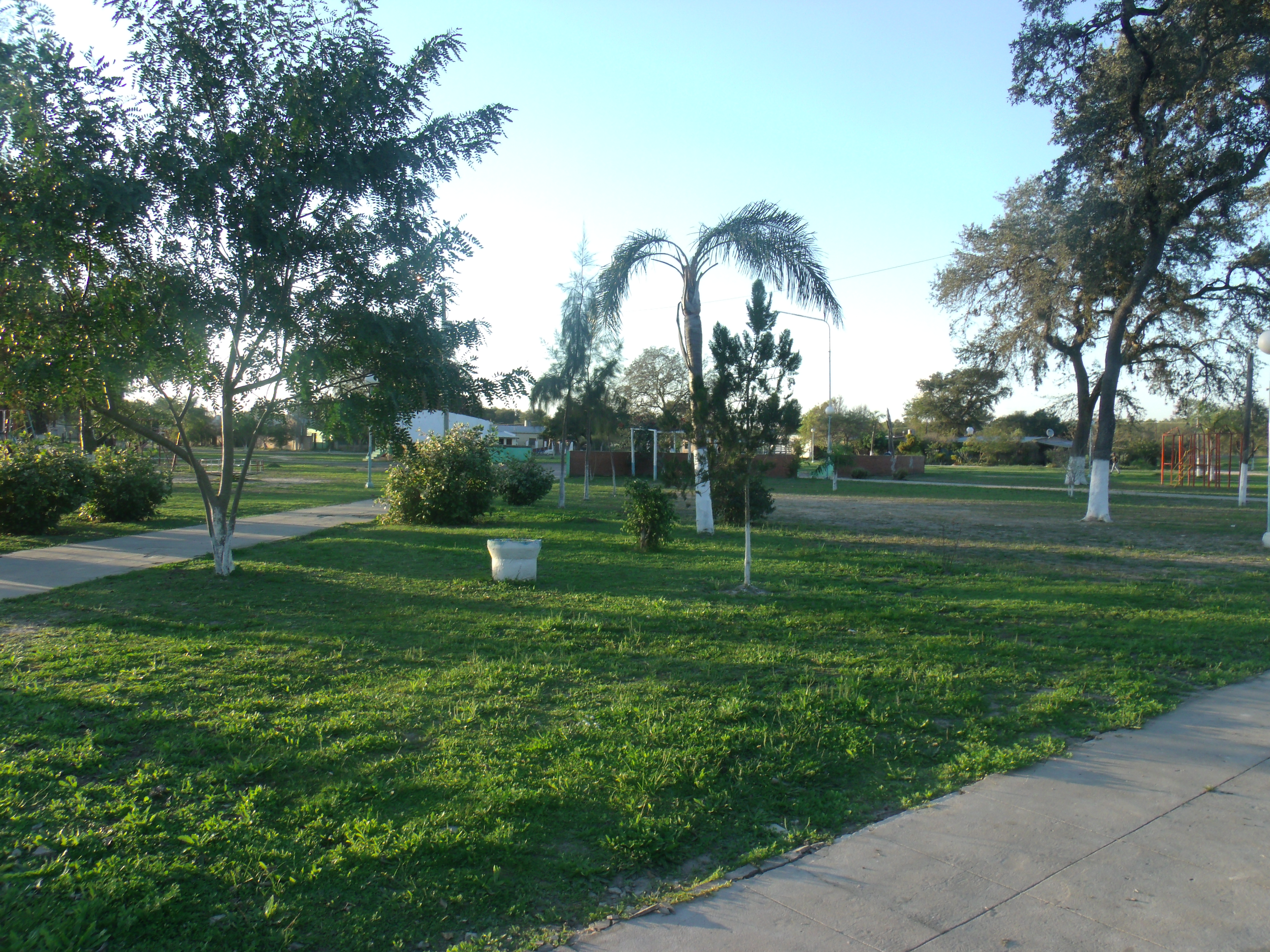 Plaza principal de La Eduvigis